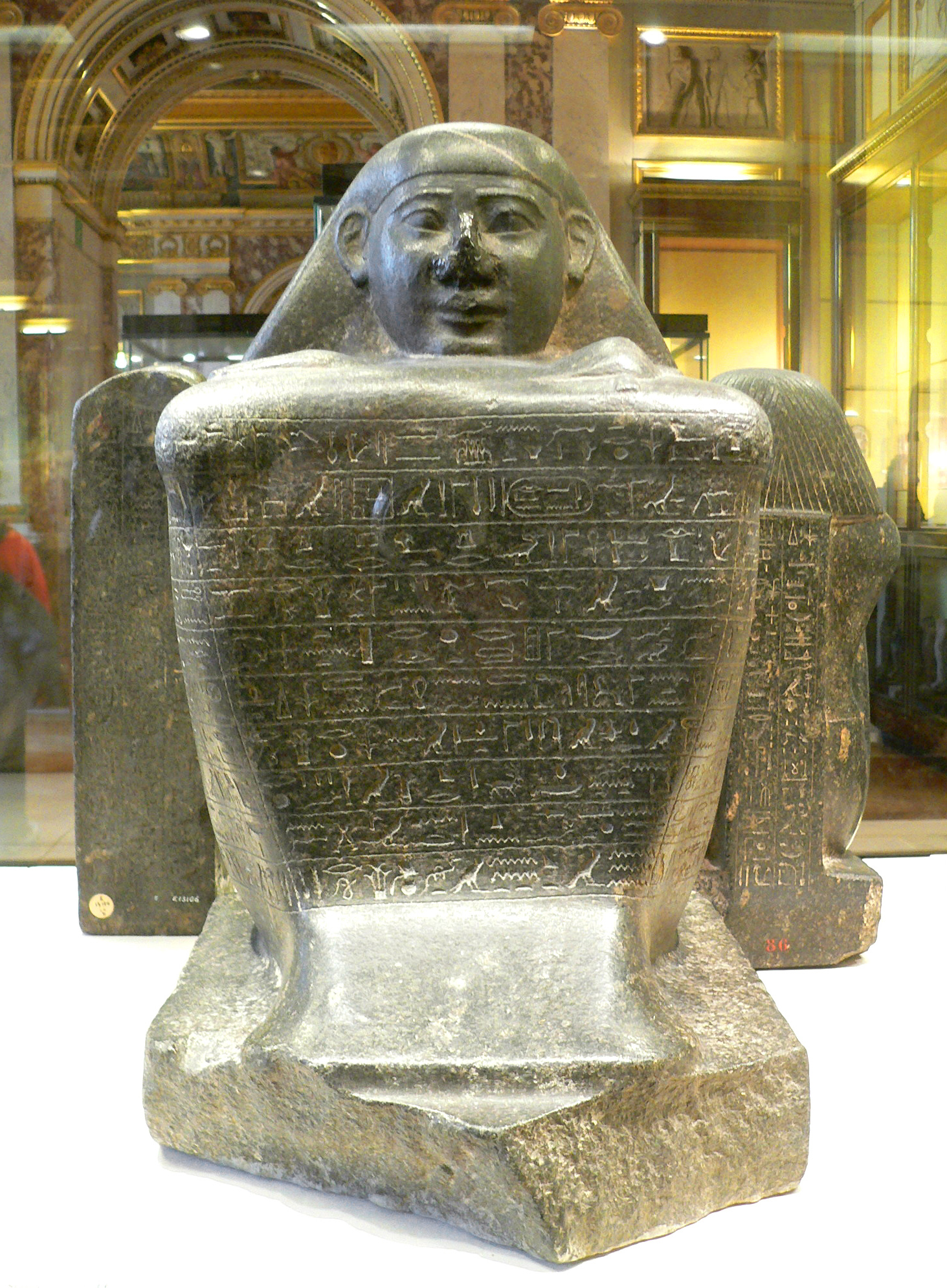 Statue cube d'Haroua, intendant de la divine adoratrice d'Amon Amenirdis, vers 700 avant J.-C. (25e dynastie), diorite.